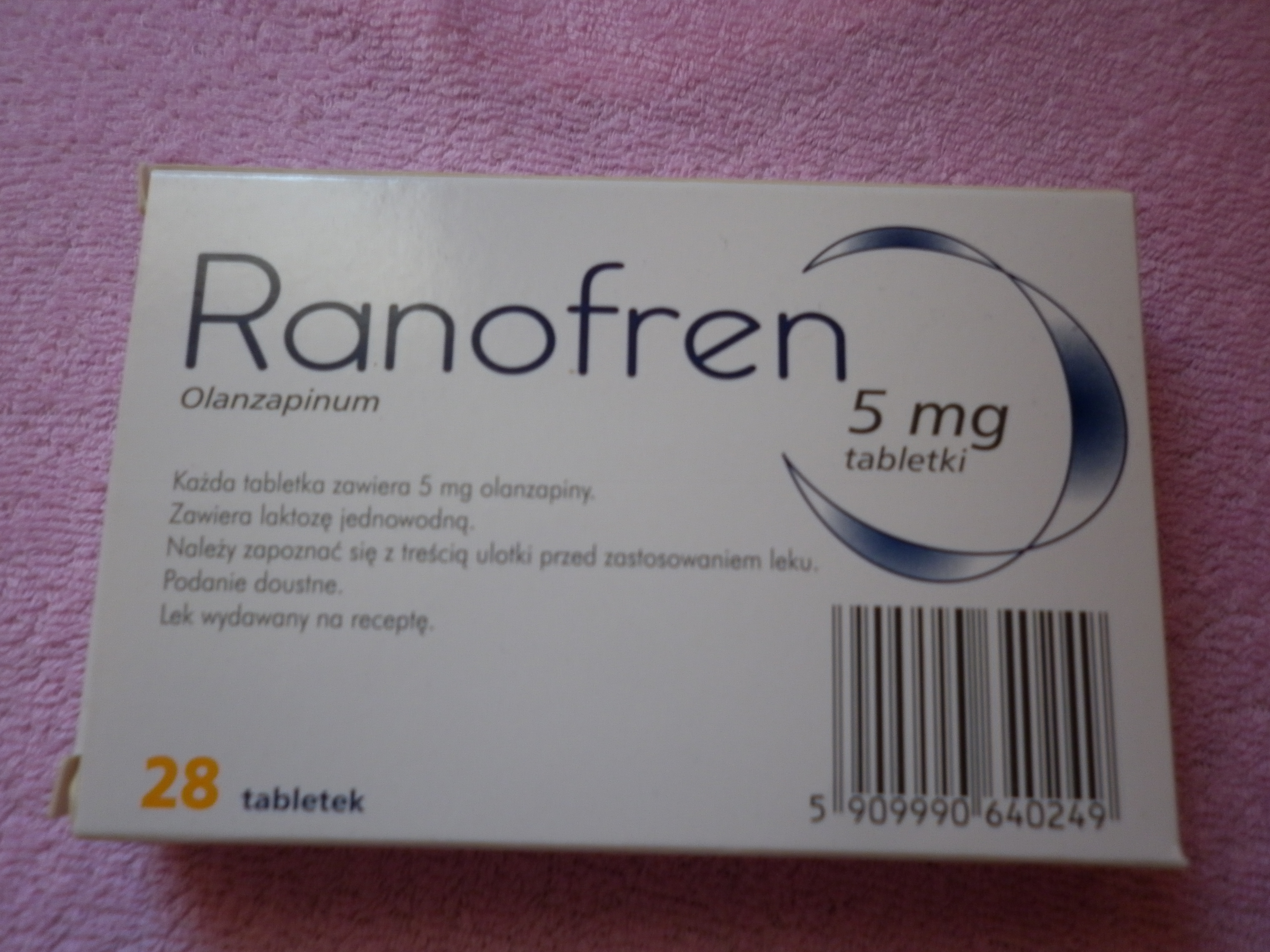 Ranofren